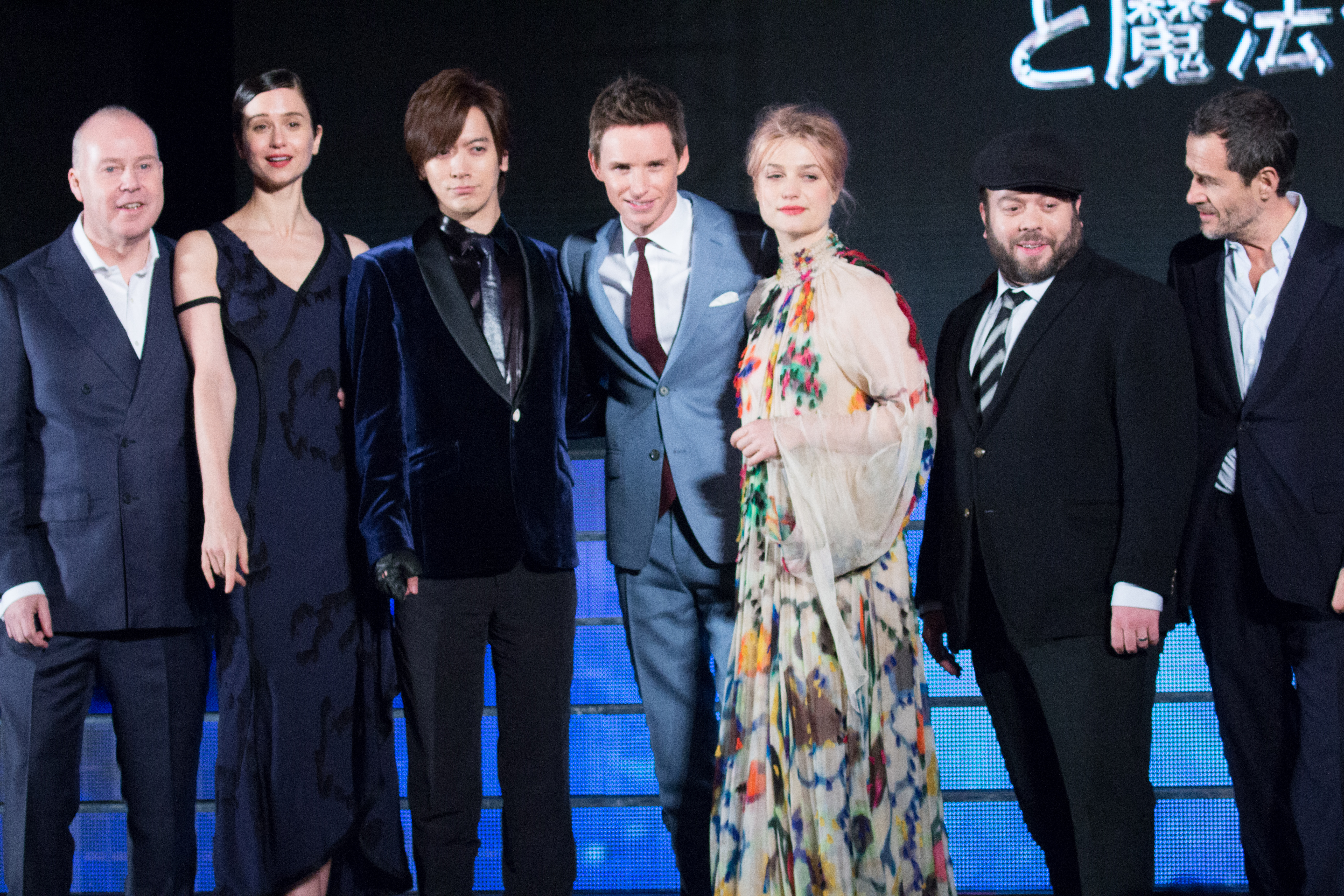 ファンタスティック・ビーストと魔法使いの旅 ジャパン・プレミア レッドカーペット エディ・レッドメイン ダン・フォグラー キャサリン・ウォーターストン アリソン・スドル デヴィッド・イェーツ デヴィッド・ハイマン DAIGO